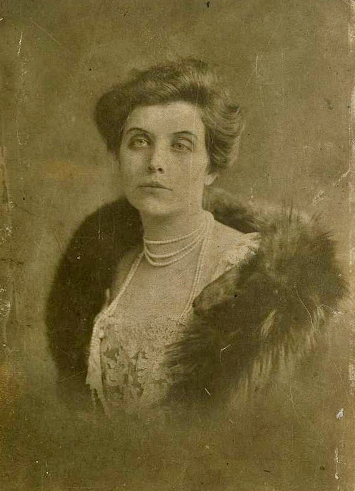 Andrássy Tivadarné Zichy Eleonóra (később ifj. Andrássy Gyula felesége)